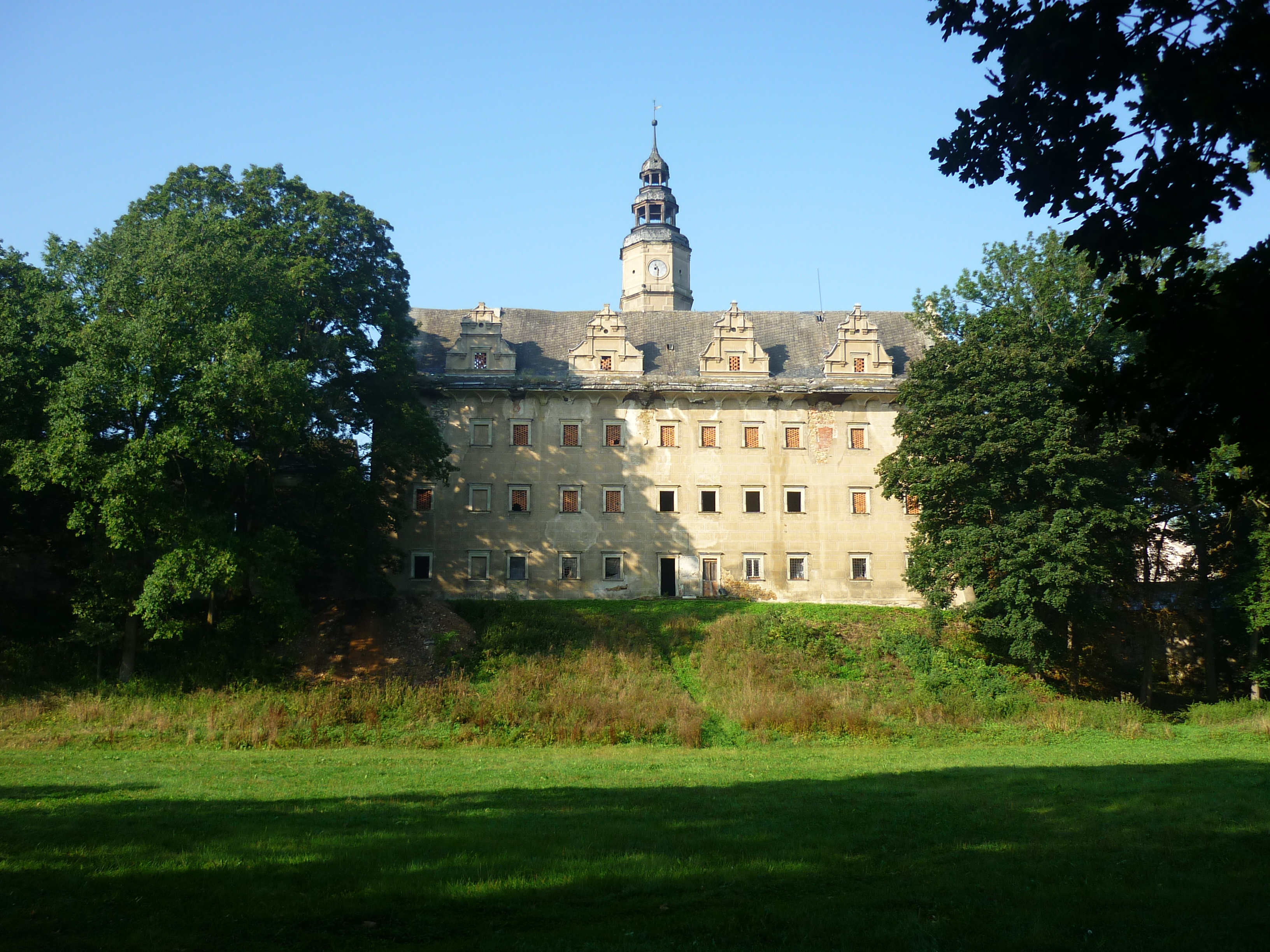 Gorzanów - zespół zamkowy: ściana kurtynowa południowa (zabytek nr rejestr. 1028/WŁ)